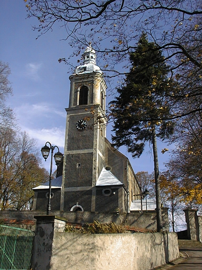 Witków - kościół parafialny p.w. Zwiastowania NMP, XVIII (zabytek nr rejestr. 917 z 31.07.1961)